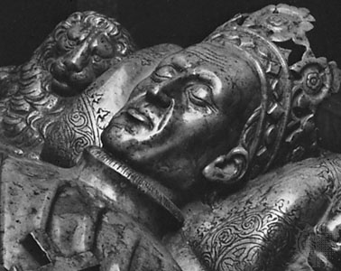 Władysław II Jagiełło, sarcophagus figure, in Wawel Cathedral, Kraków, Poland.